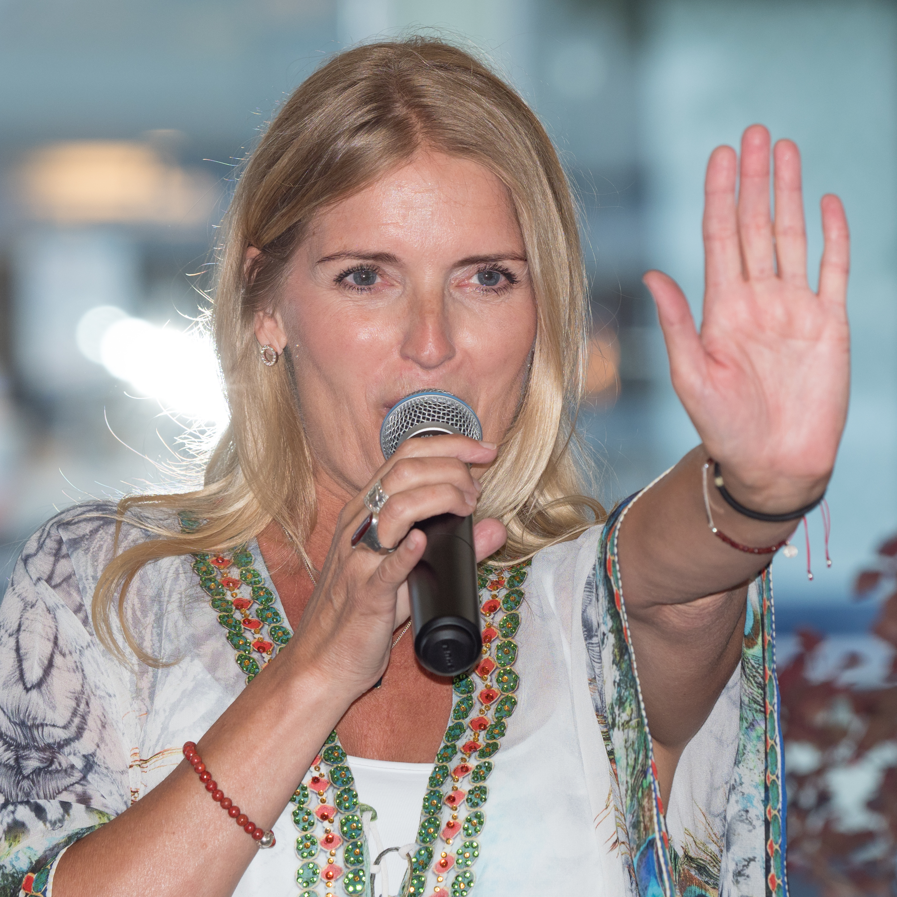 Suzzie Tapper & Karin Wistrand at Winbergs, Vaxholm, Stockholm, Sweden, July 2018